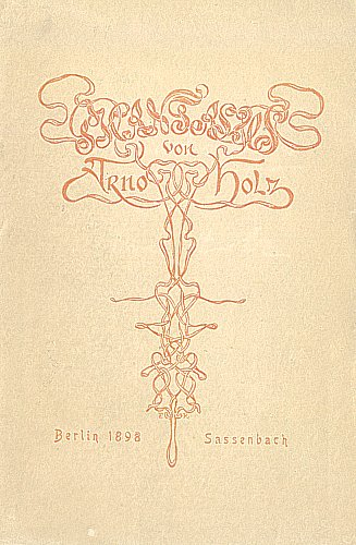 Арно Холц, корица на стихосбирката "Фантазус", 1898 г.